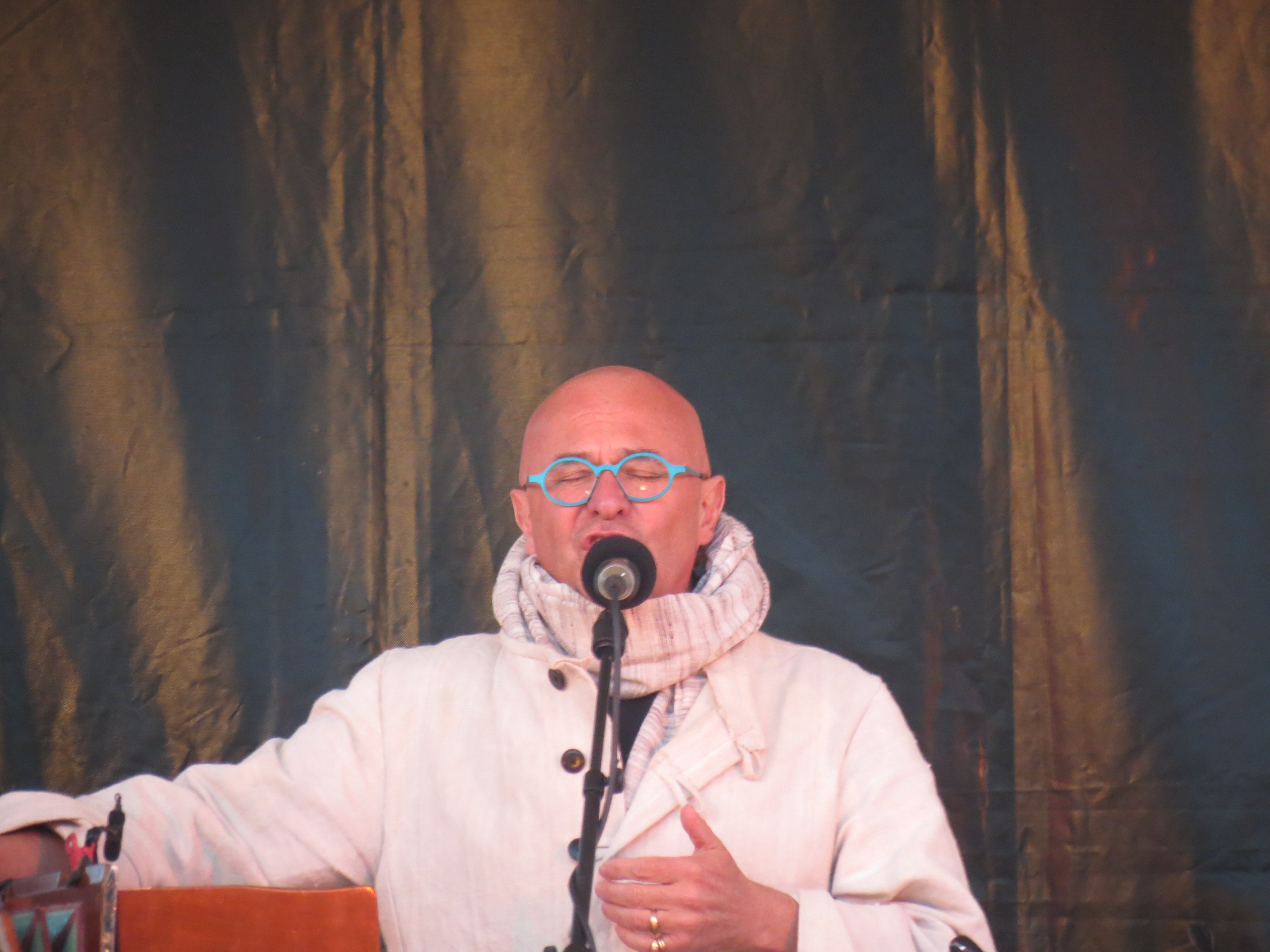 Yann-Fañch Kemener du groupe Barzaz dans le cadre des Festi'Cités de Guérande.